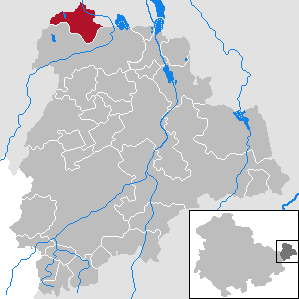 Lucka in Thuringia - District Altenburger Land